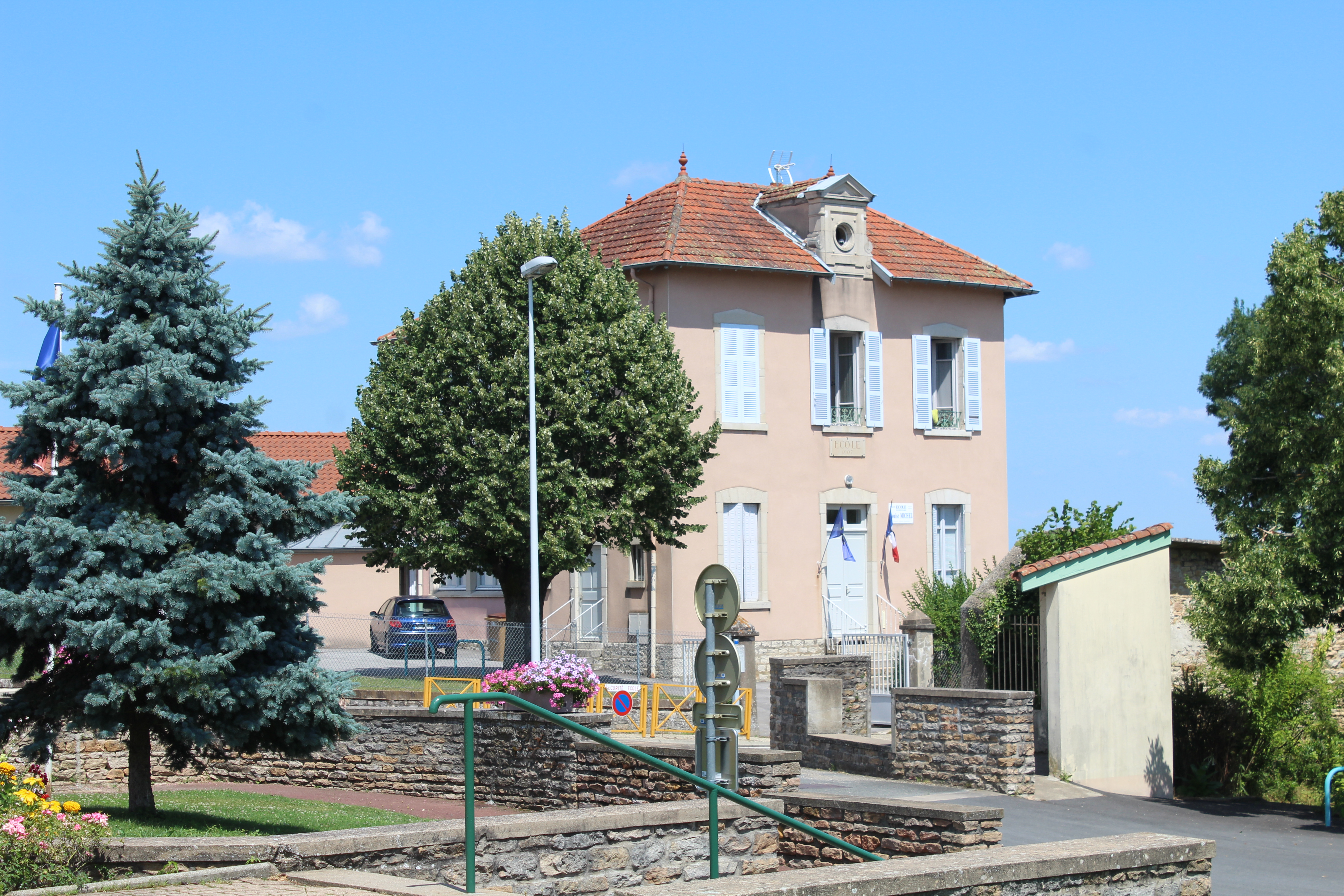 École élémentaire Louise Michel de Saint-Jean-le-Priche.